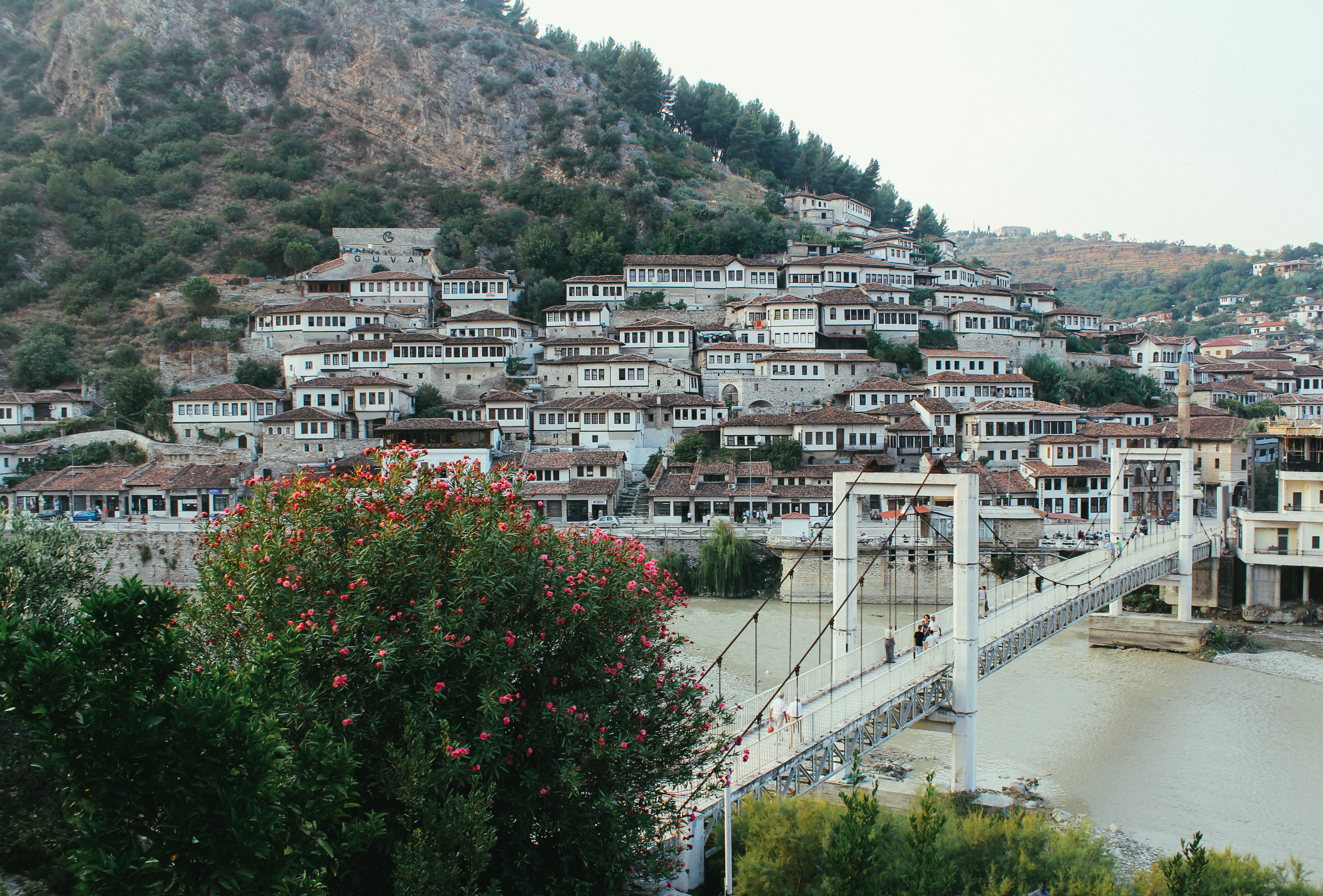 Вид на исторический центр Берата